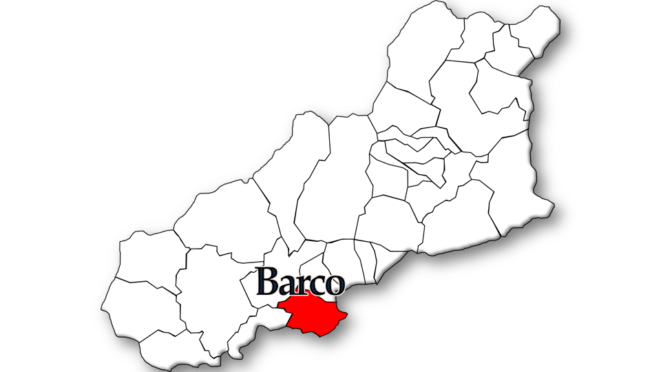 População